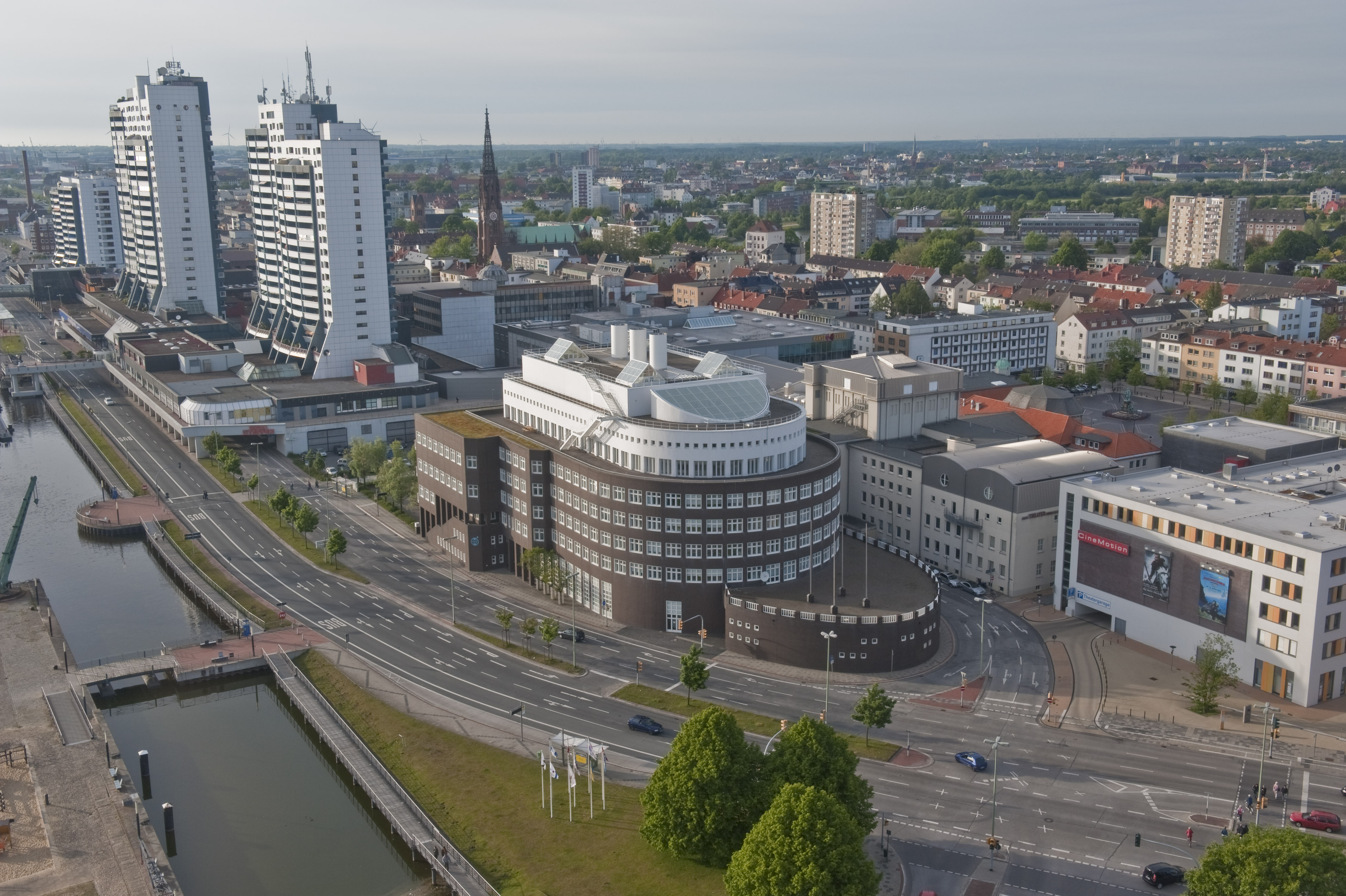 View from Richtfunkturm in Bremerhaven Columbus Center und Alfred-Wegener-Institut